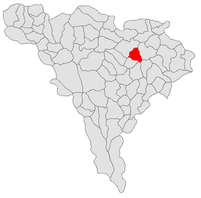 Categorie:Hărţi ale judeţului Alba